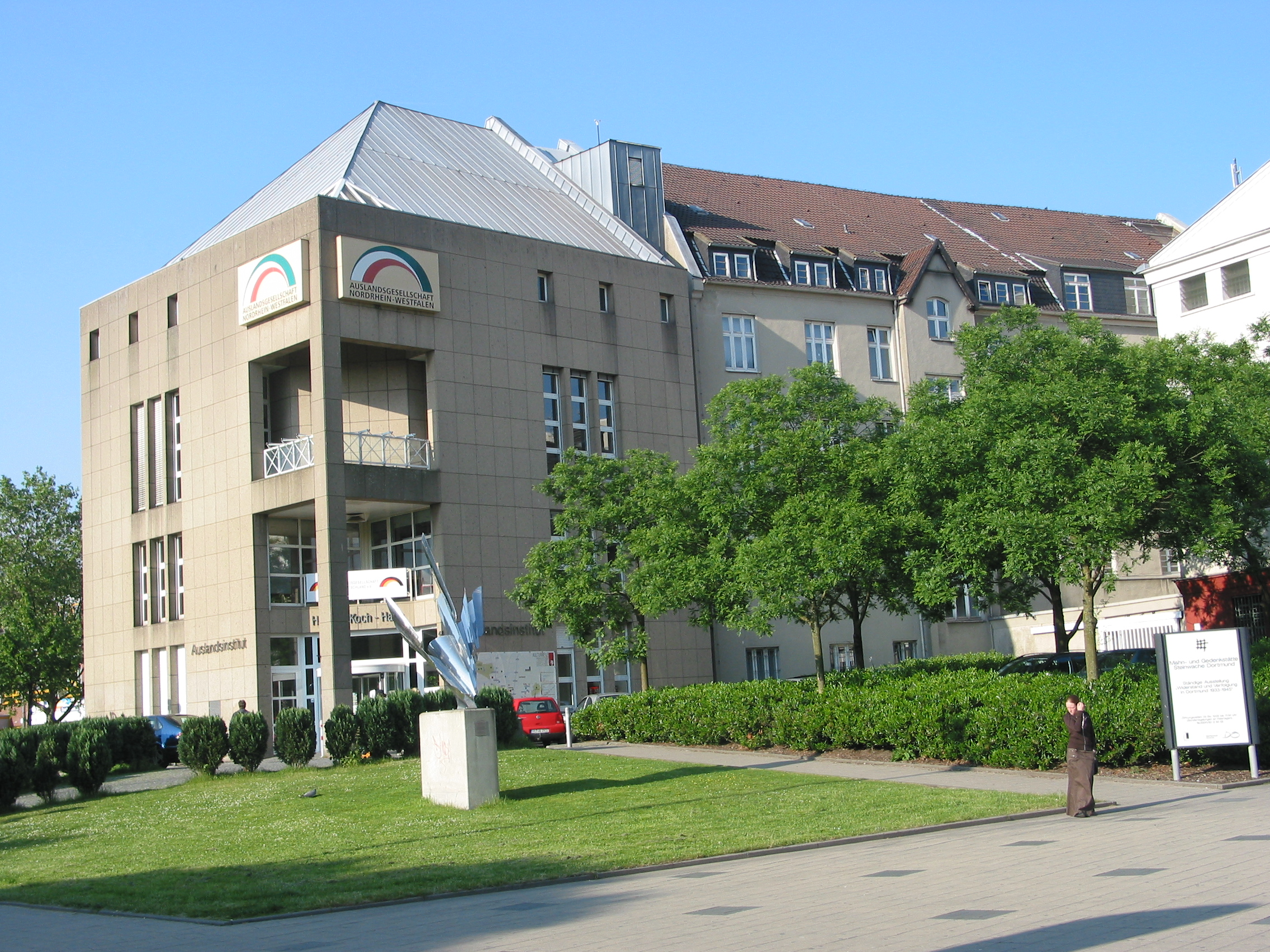 Hans-Koch-Haus mit der Auslandsgesellschaft Nordrhein-Westfalen Steinstr. 48